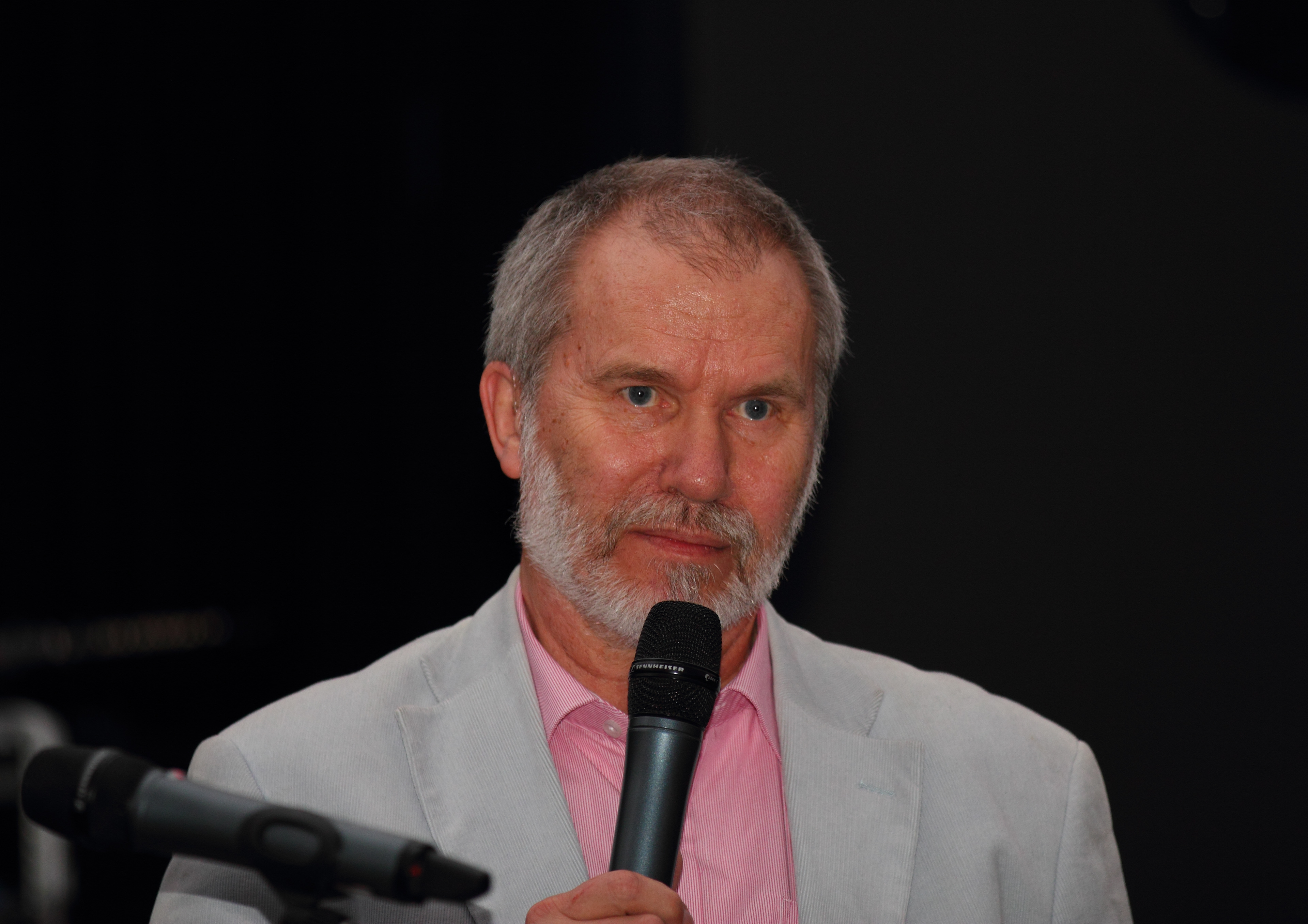 Verleihung des Schallwelle-Musikpreises am 10. März 2012. Kuppel des Planetariums Bochum. Johannes Schmoelling erhält den zweiten Sonderpreis für 2011. Laudator ist Winfrid Trenkler.